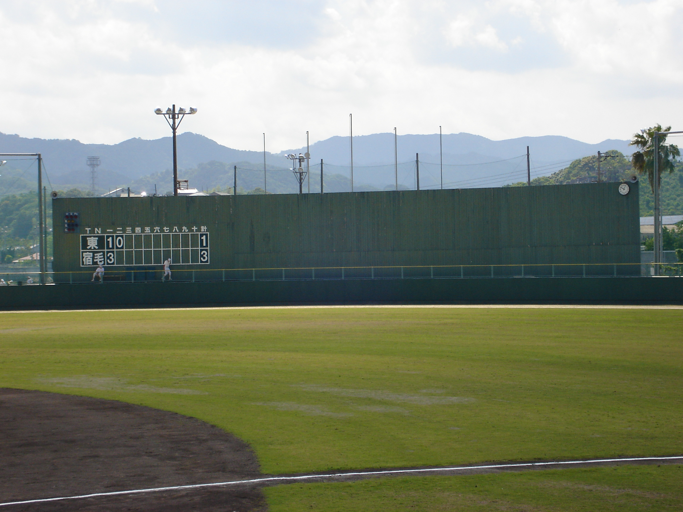 宿毛市野球場。 - 日本国高知県宿毛市にある野球場。